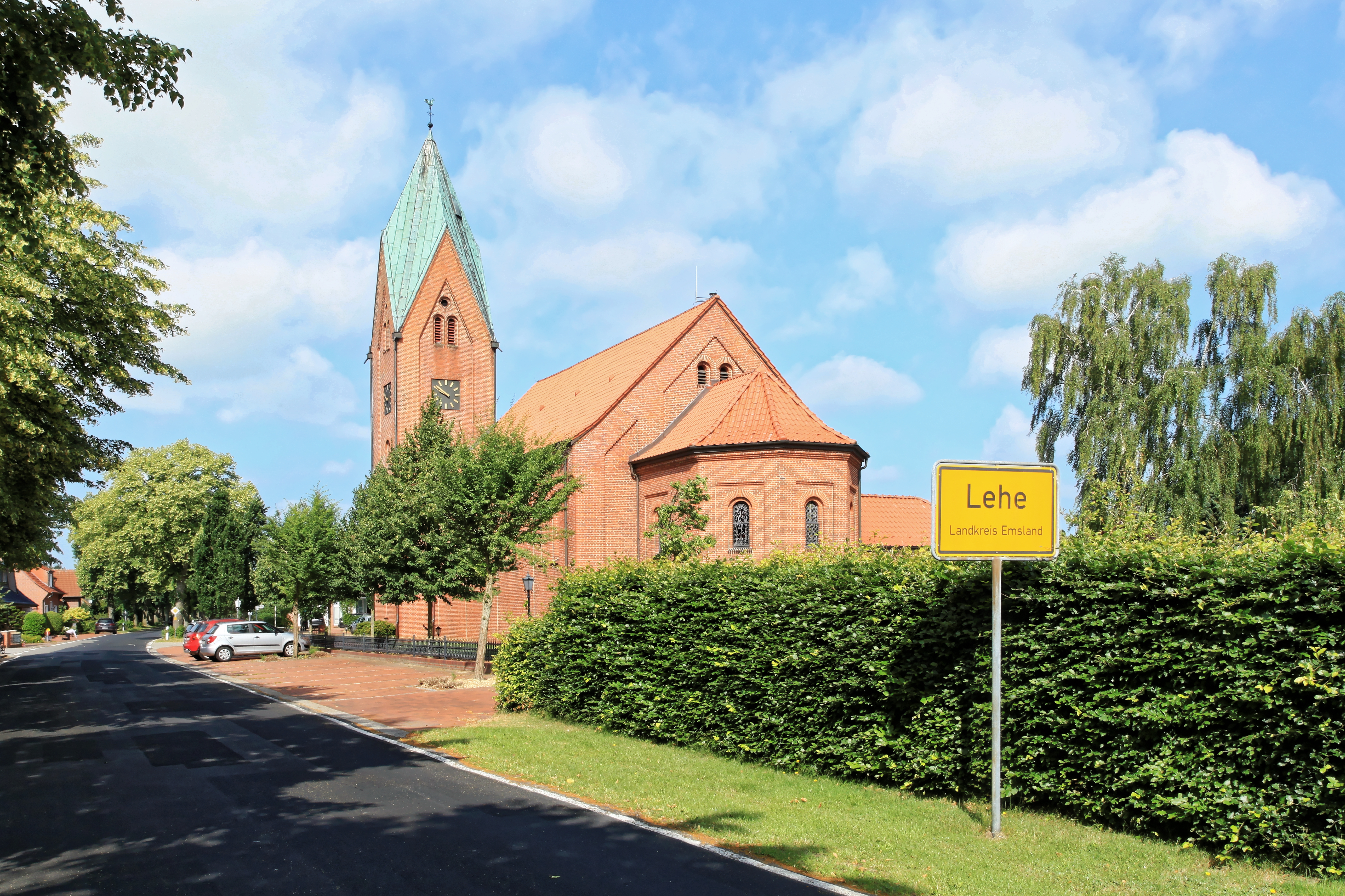 Herz-Jesu-Kirche an der Dorfstraße in Lehe (Emsland)